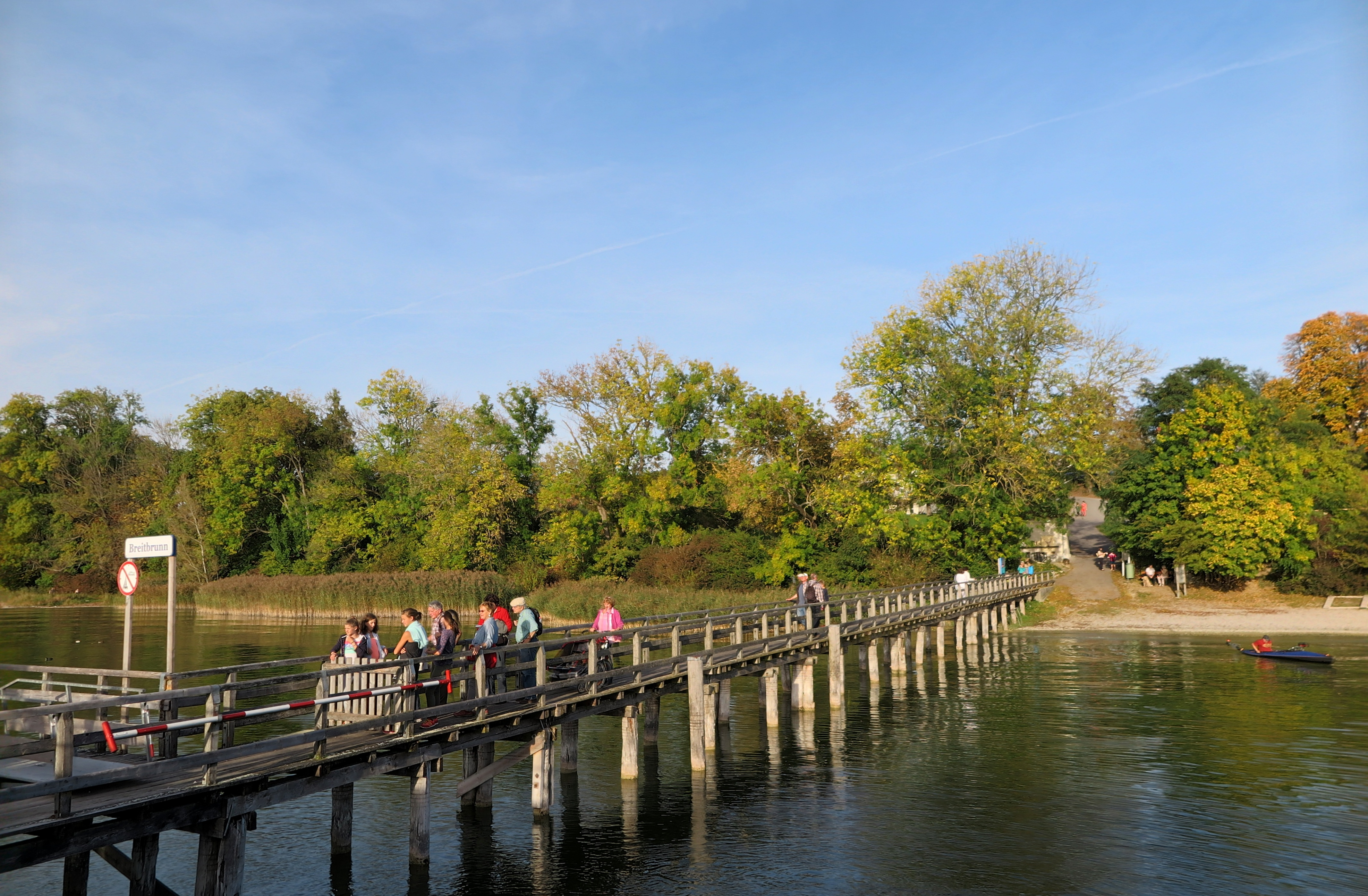 Deutschland, Bayern, Oberbayern, Landkreis Starnberg, Herrsching am Ammersee, Schiffsanlegestelle in Breitbrunn